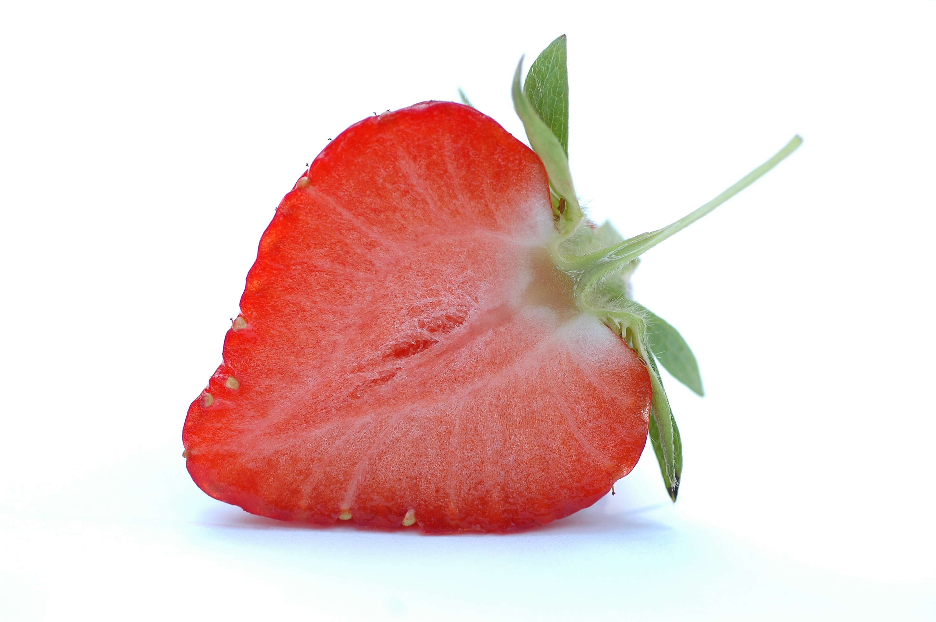 Strawberry